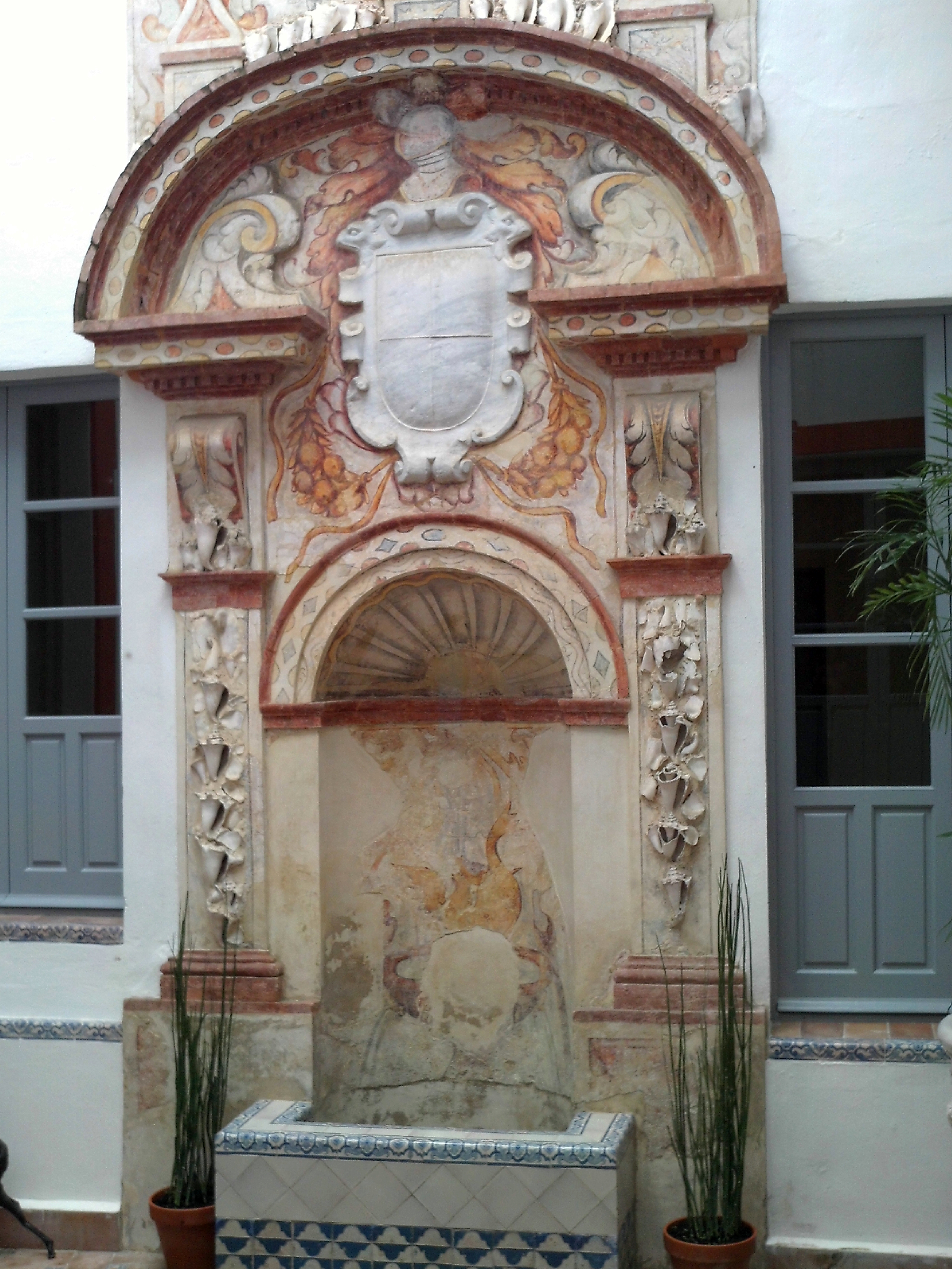 Fuente de la Casa Fabiola. Sevilla, Andalucía, España.